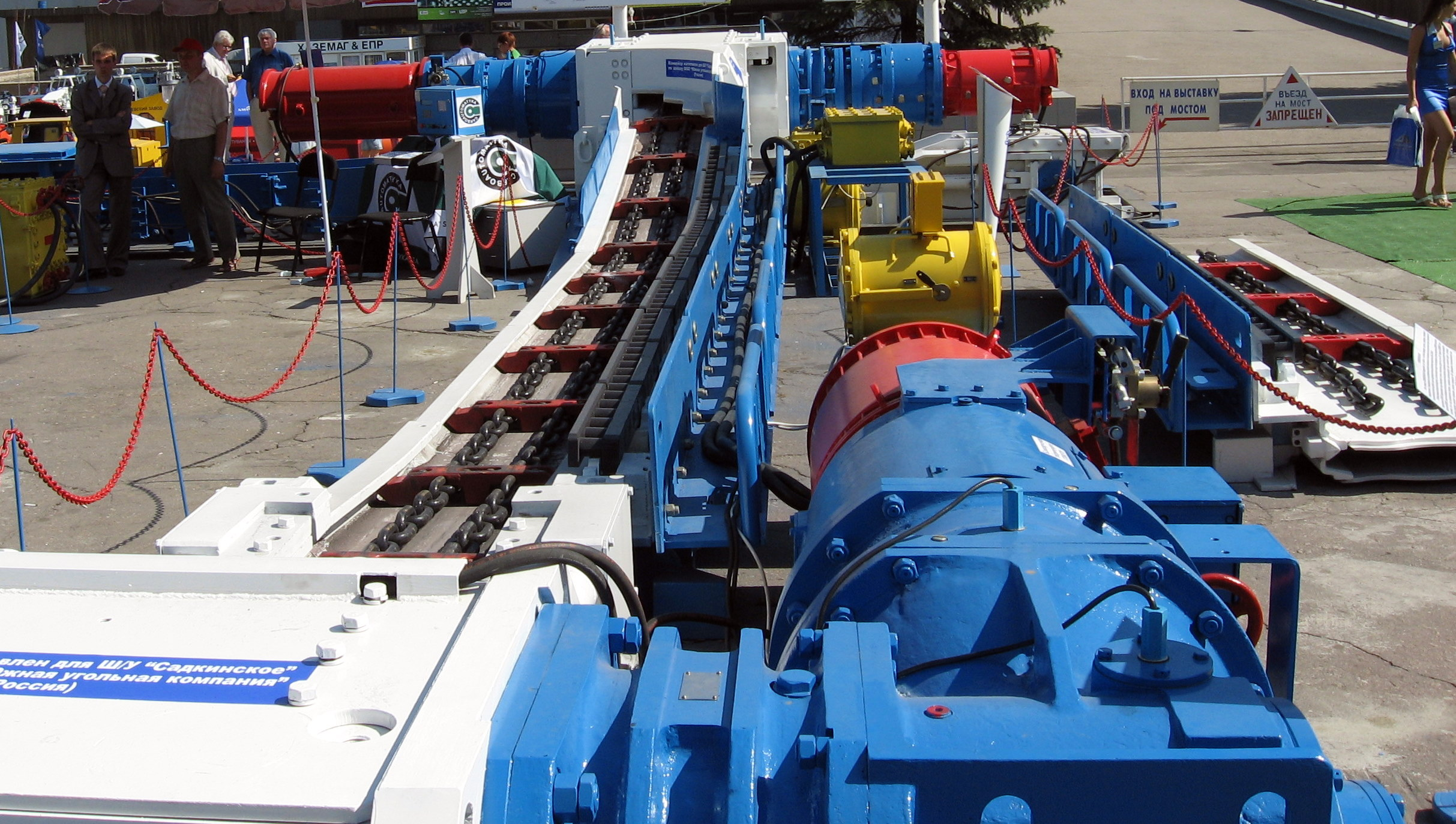 Лавний сребковий конвеєр (фото з виставки Уголь-Майнінг-2008, Донецьк)